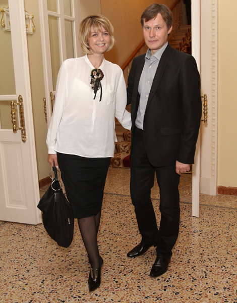 Фестиваль и премия «Золотая маска» 2012 года